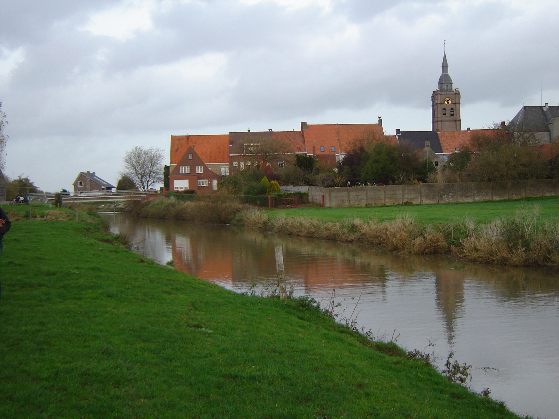 Roesbrugge en de IJzer, Poperinge. Roesbrugge and the Yser river in Roesbrugge-Haringe, Poperinge, West-Flanders, Belgium.